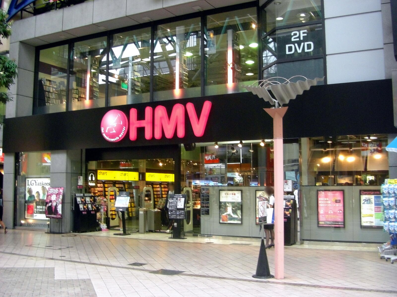 HMV仙台一番町店